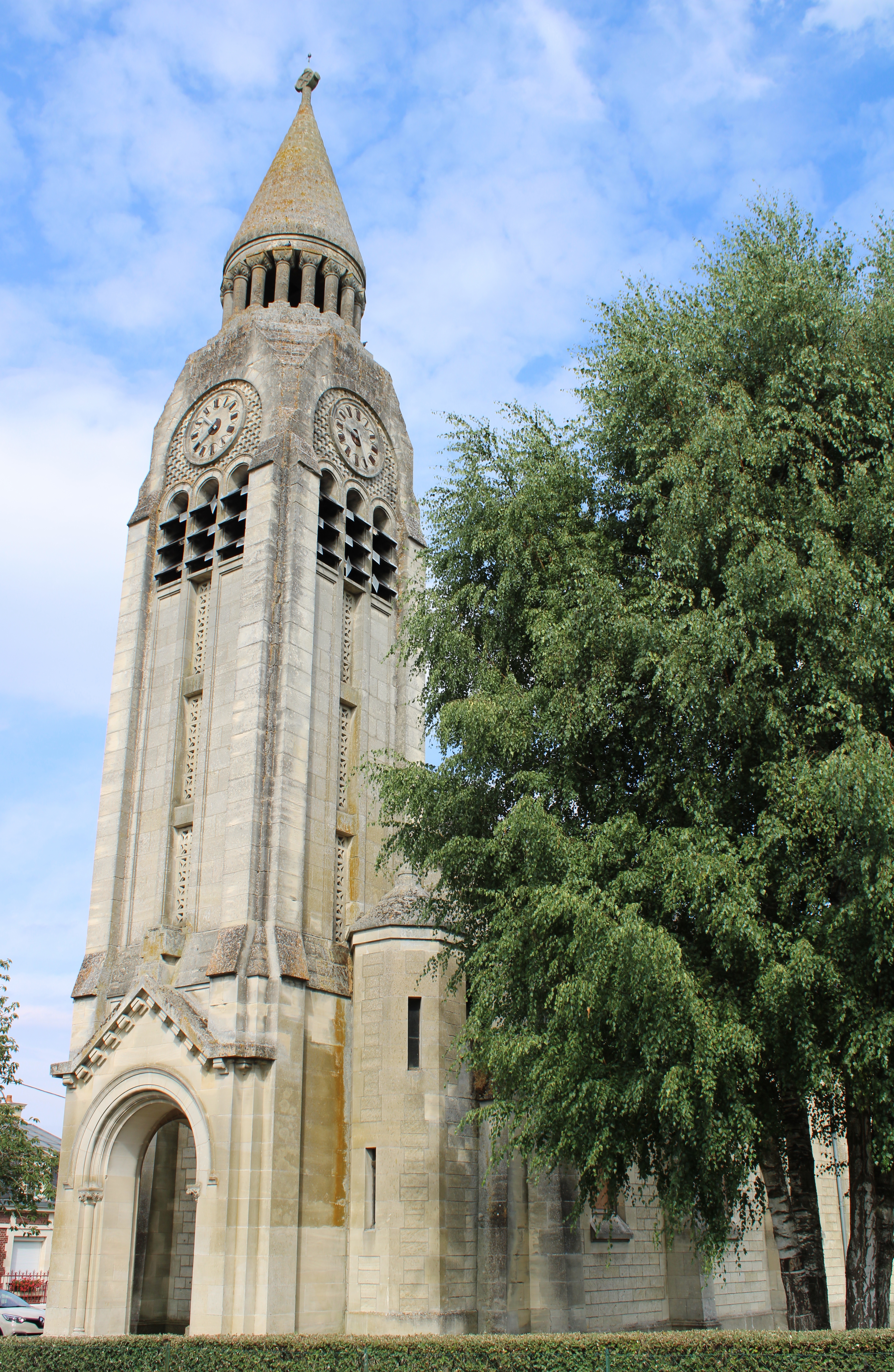 L'église.